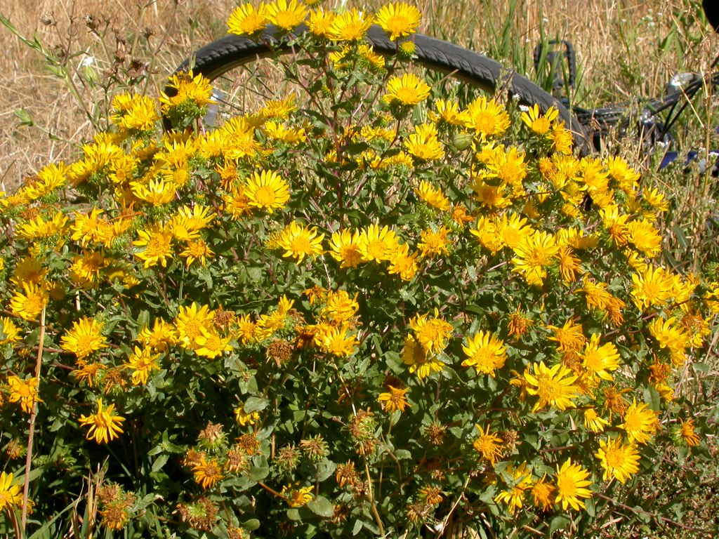 Grindelia squarrosa habit